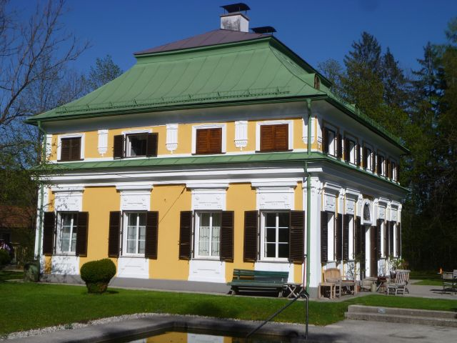 Spauer Schlössl in Thalgau